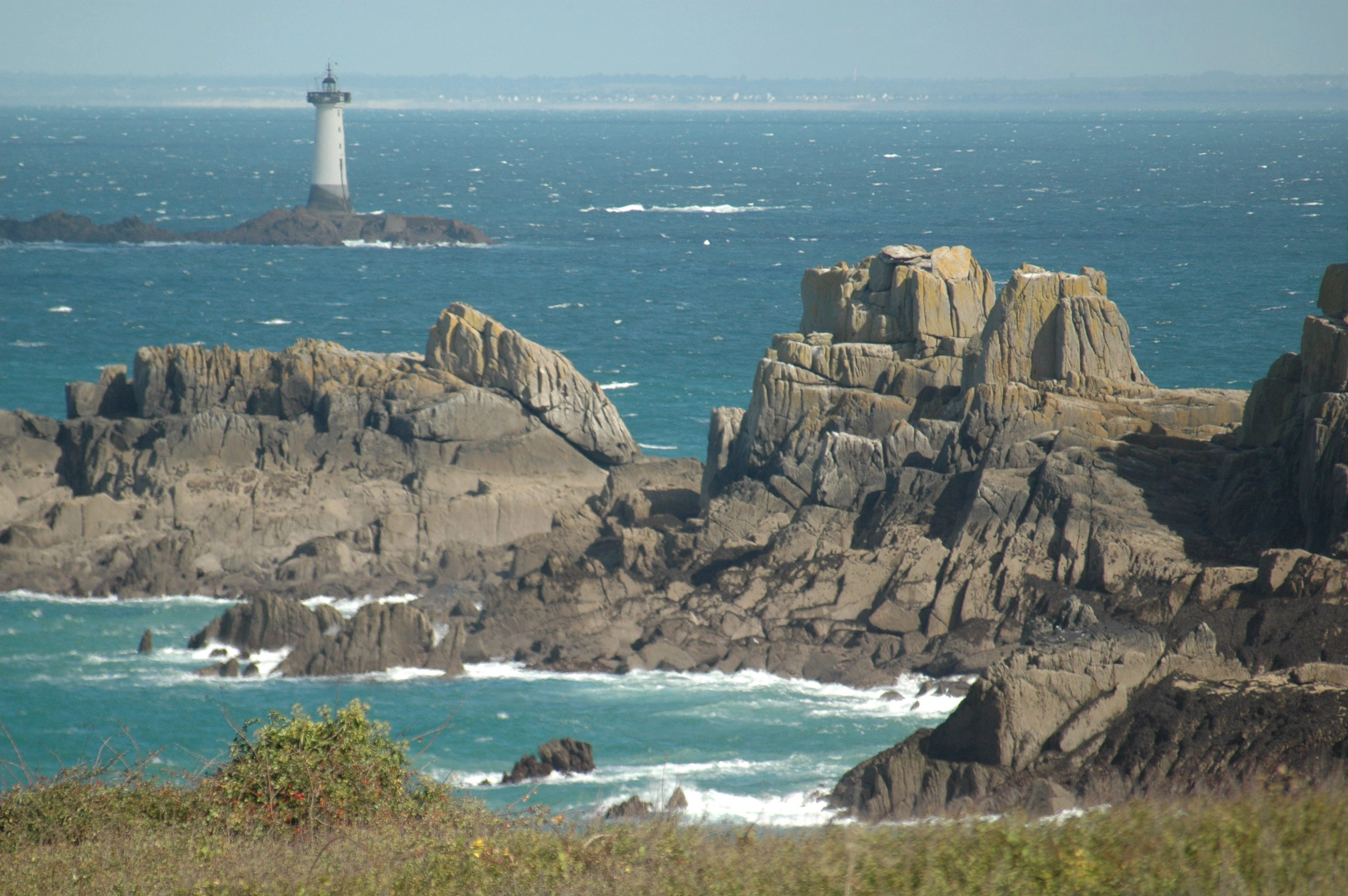 The Point du Grouin, France